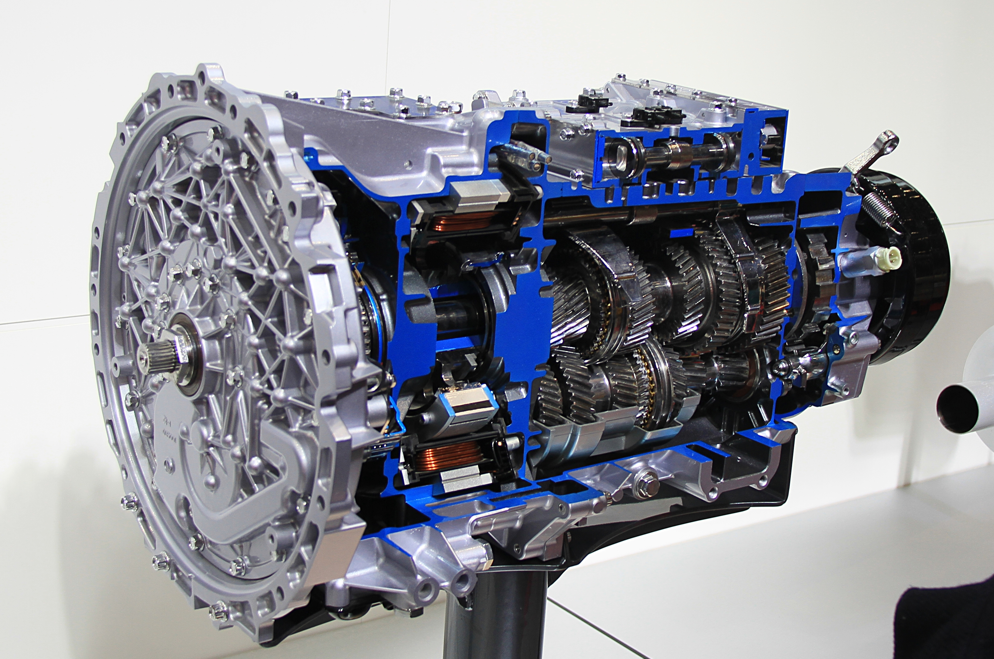 Fuso AMT